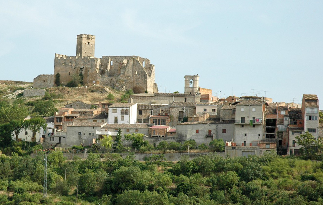 Ciutadilla, Urgell, Catalonia